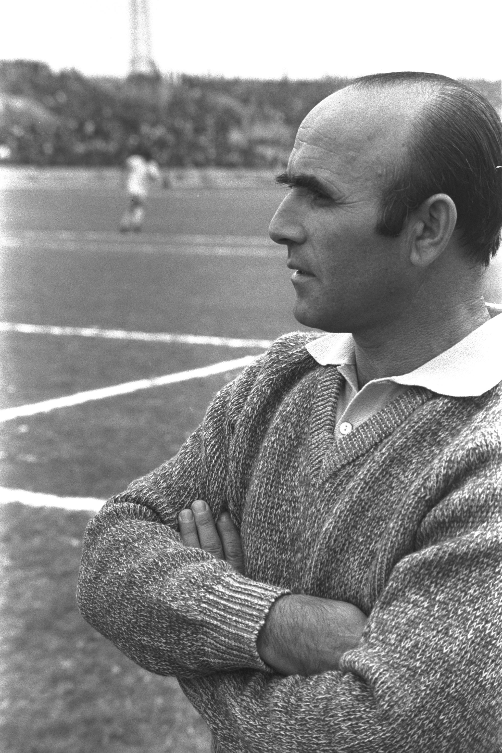 Emanuel Shefer, coach of the national soccer team. עמנואל שפר, מאמן נבחרת ישראל בכדורגל